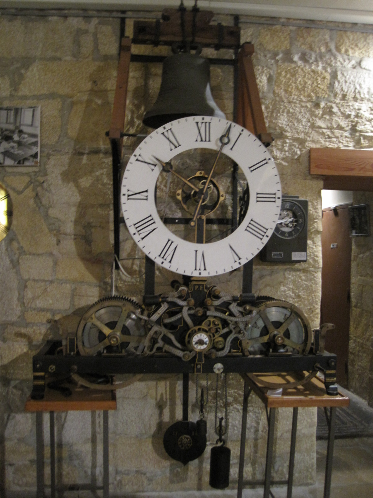 Musée de l'horlogerie de Morteau - Horloge du clocher de Morteau signée Paget à Morez - 1930